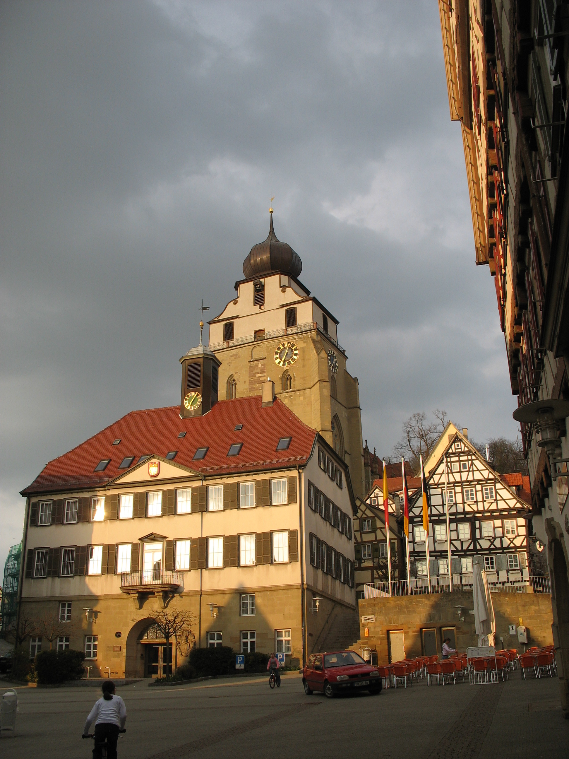 Herrenberg)